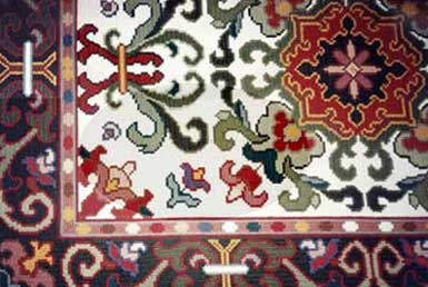 Motivo de Arraiolos tradicional.